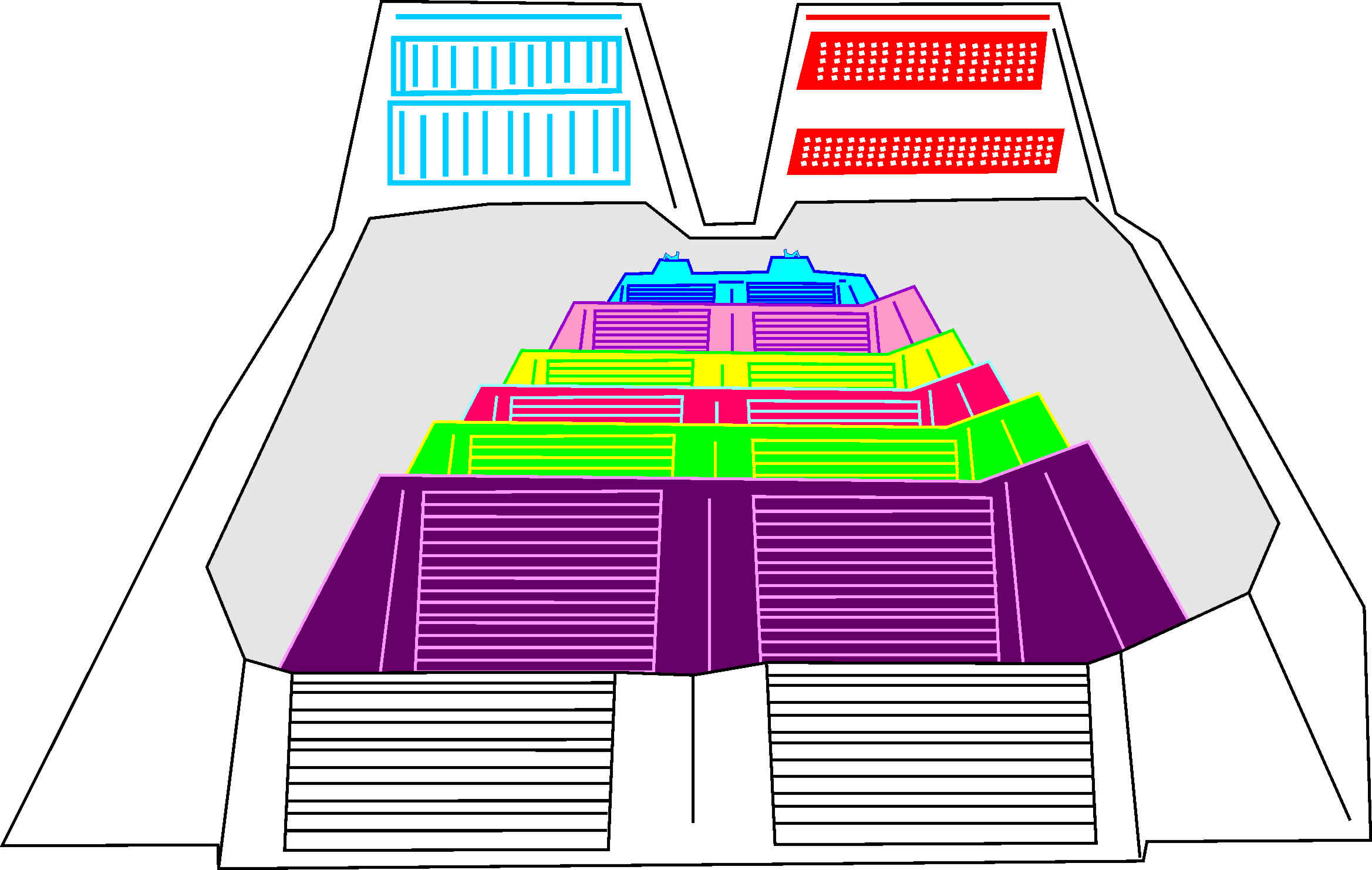 ESta en una imagen que muestra las 7 capas en la que fue construido el templo mayor.